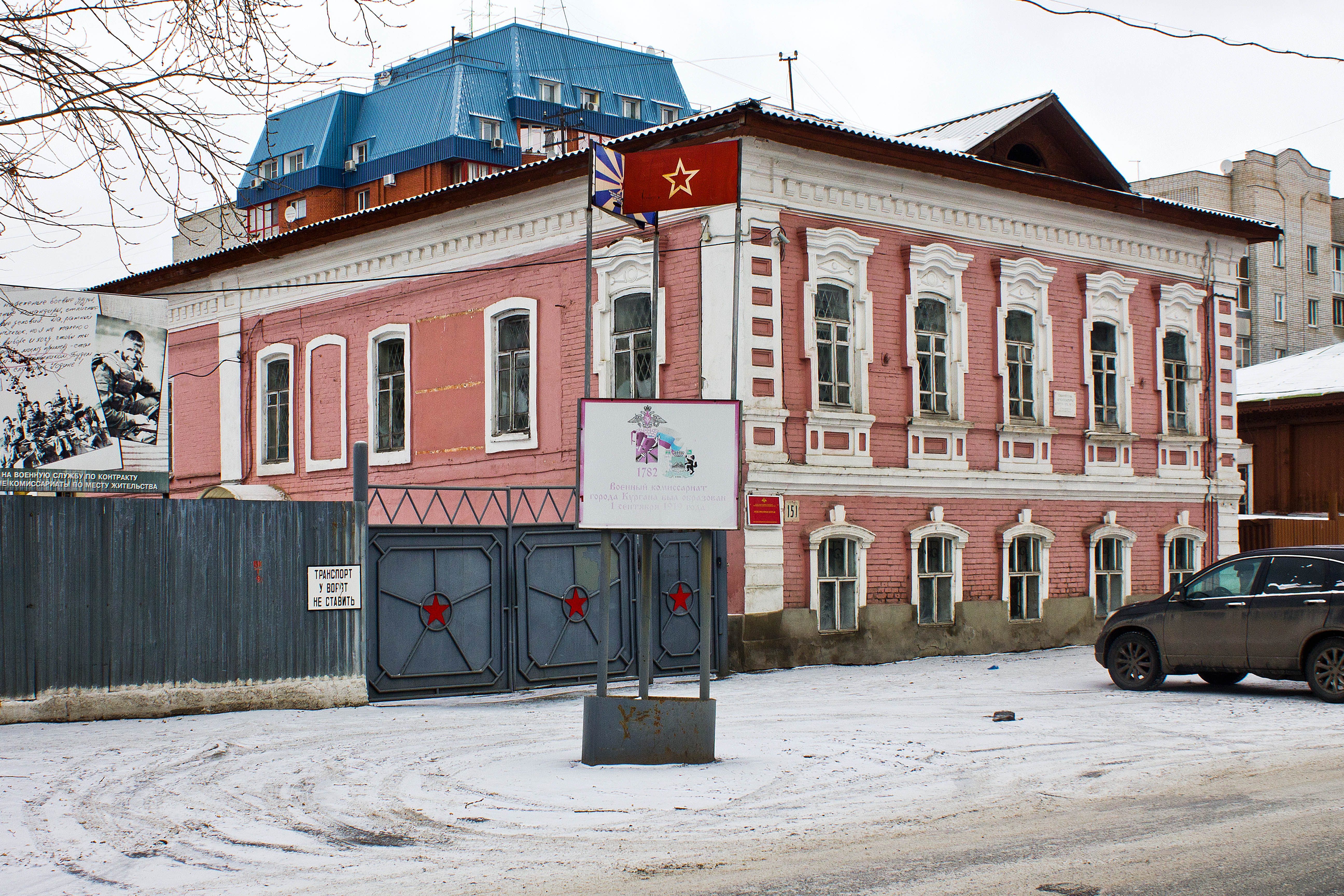 Здание Лесной школы (Курганская область, Курган, улица Советская, 151к1)